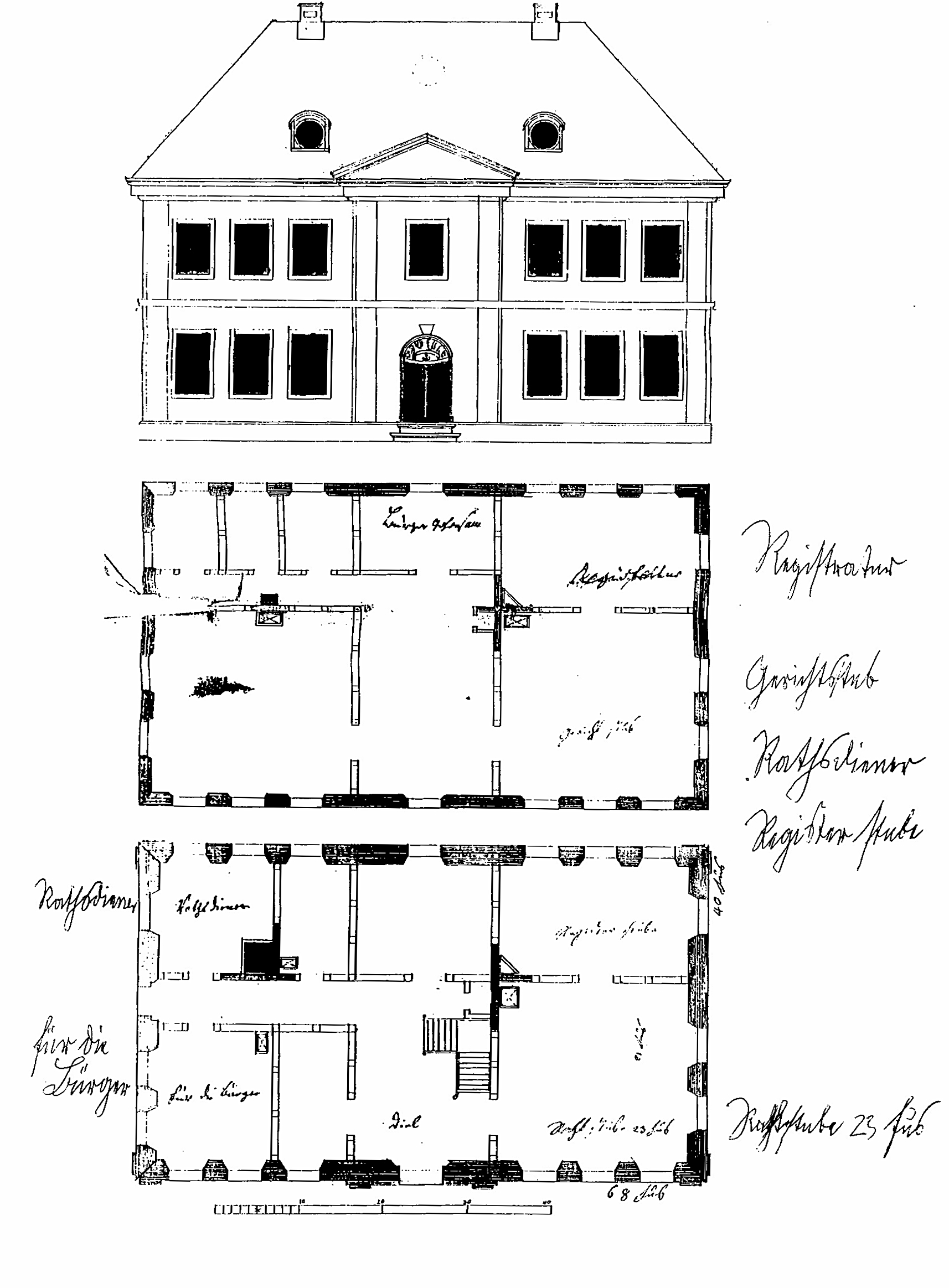 Bauplan des Rathauses in Röbel